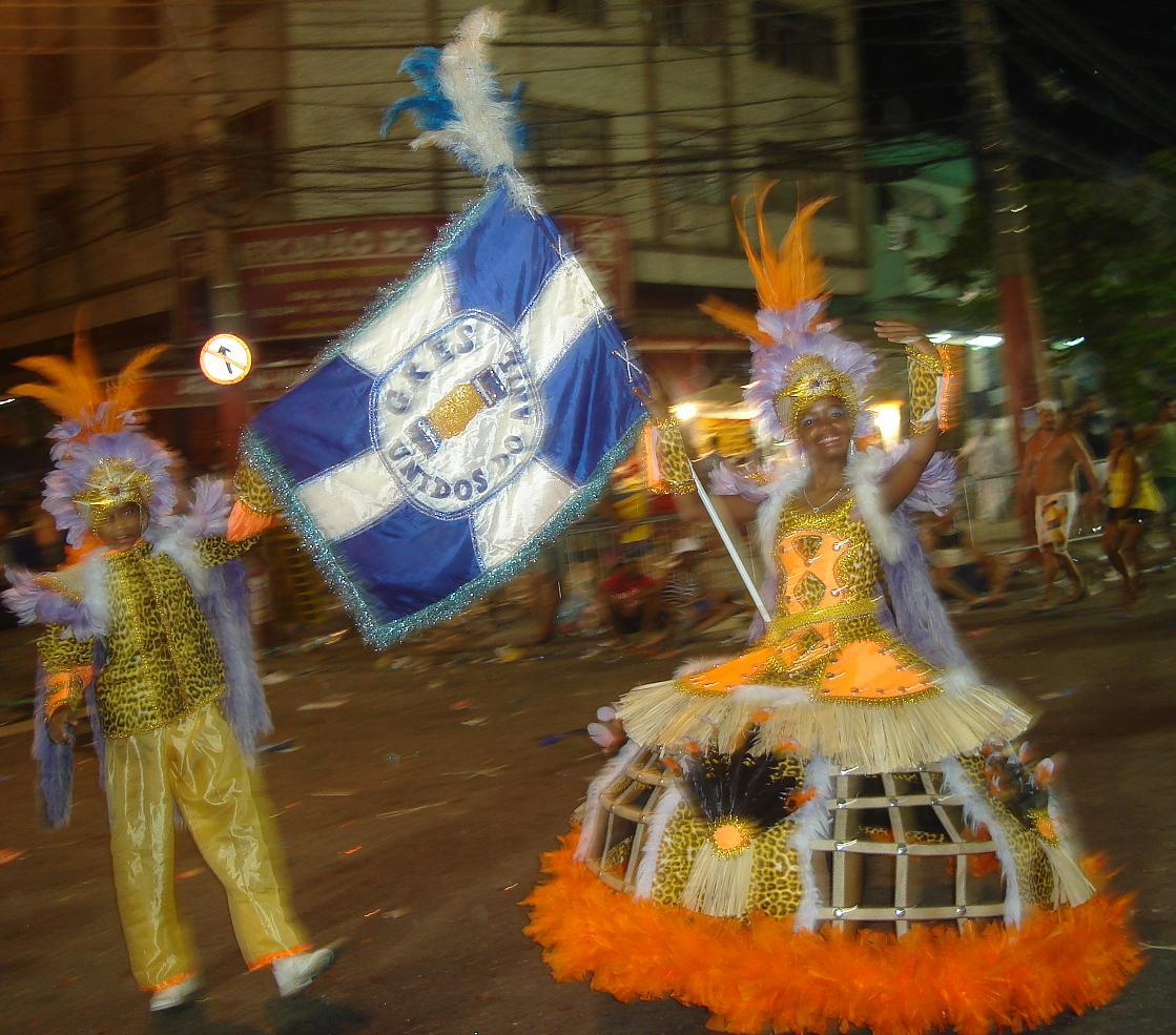 GRES Unidos do Anil, mestre sala e porta bandeira, carnaval 2010.